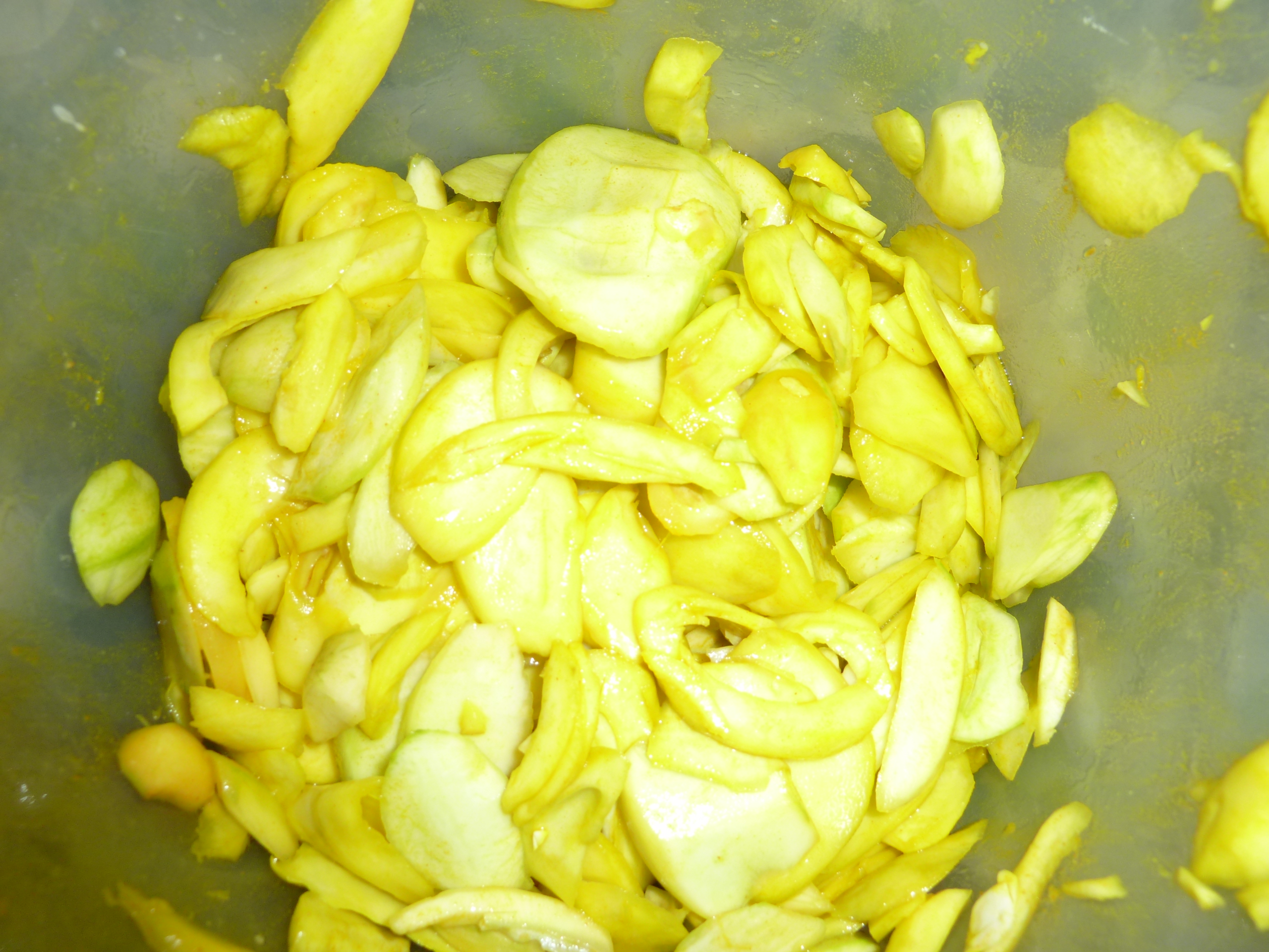 మాగాయ ముక్కలు